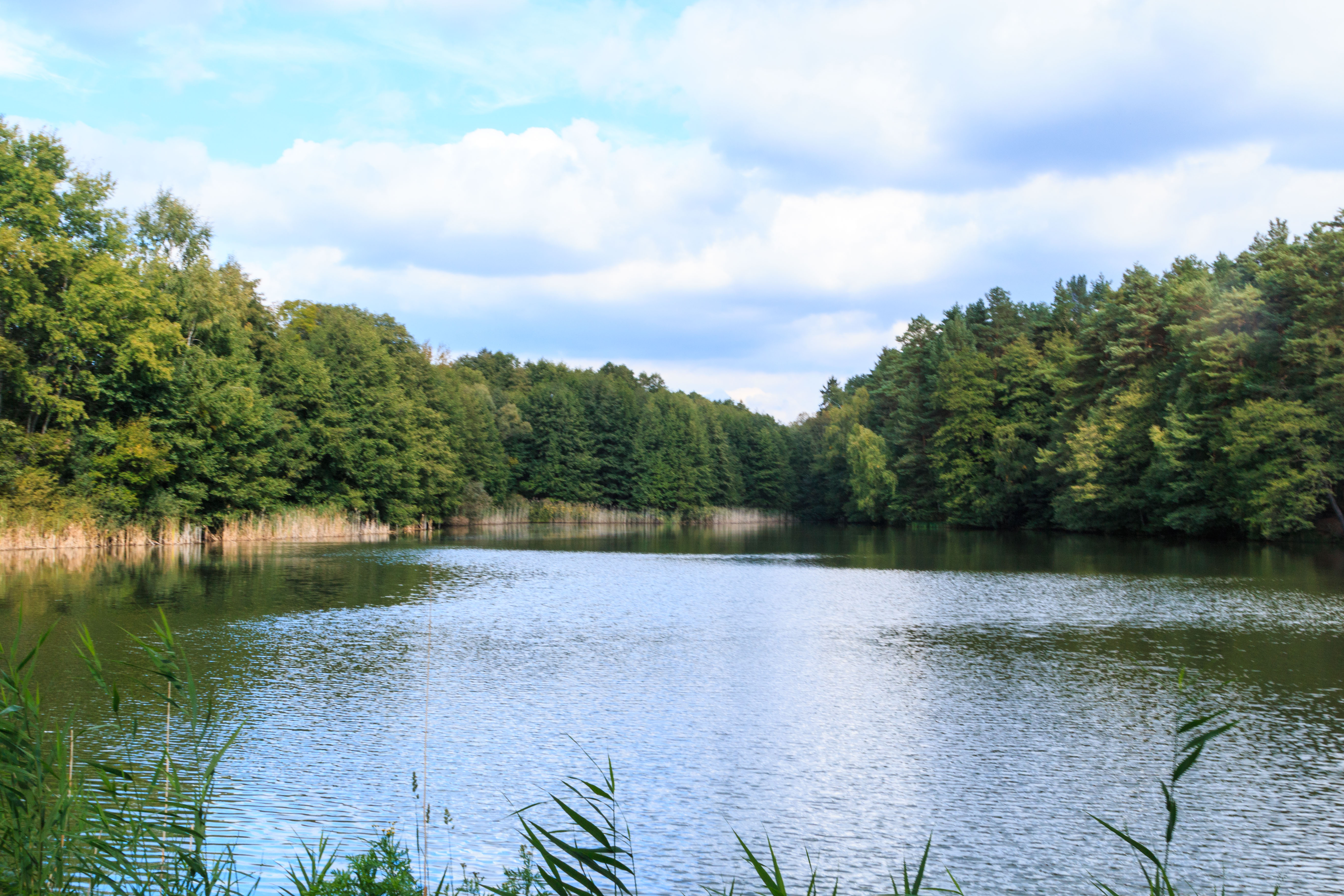 Novodvorský rybník II Project: Vodstvo.